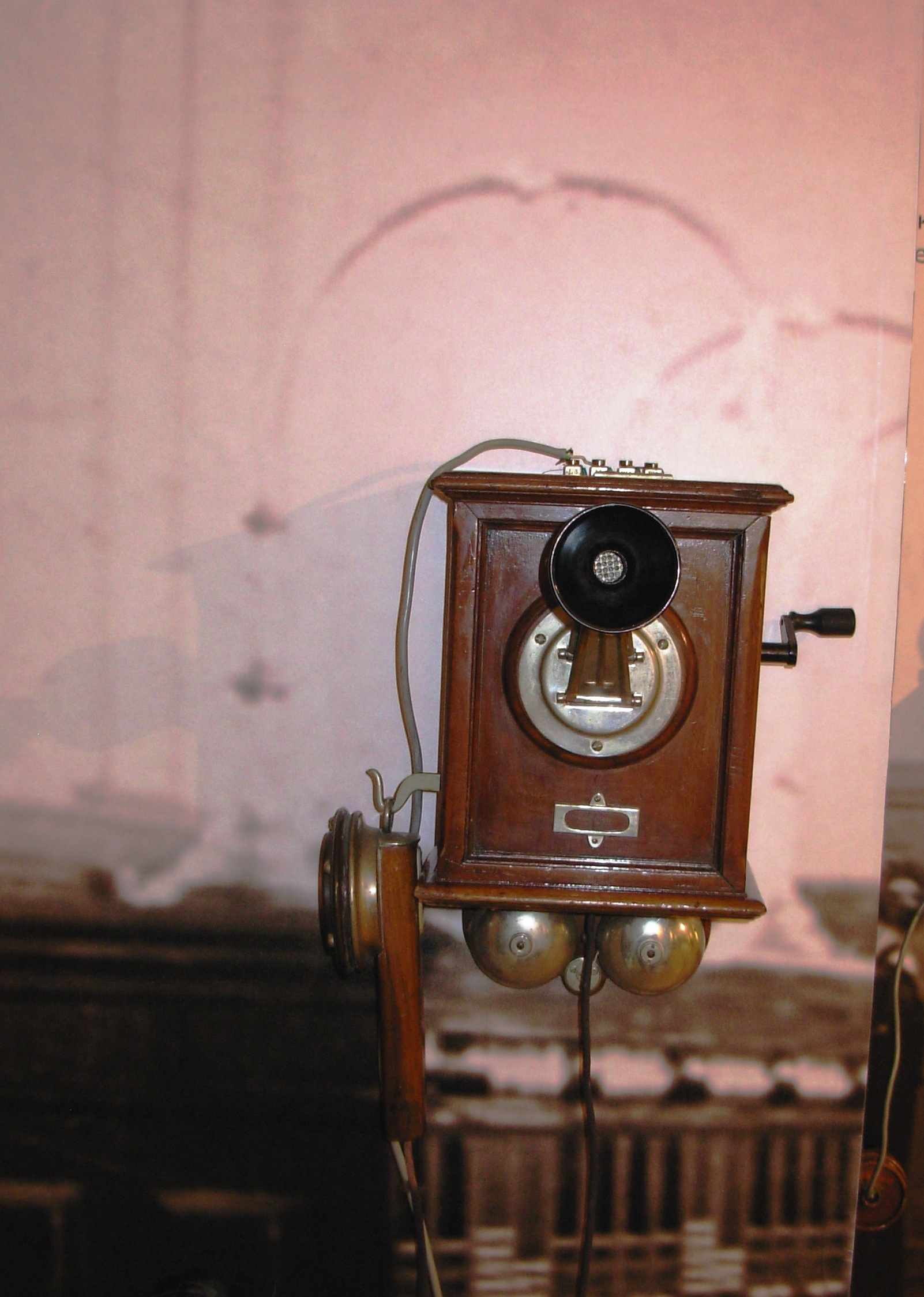 Induktorski telefon - stalna postavka u Muzeju PTT-a, ulica Majke Jevrosime, Beograd. Slikao Goldfiger